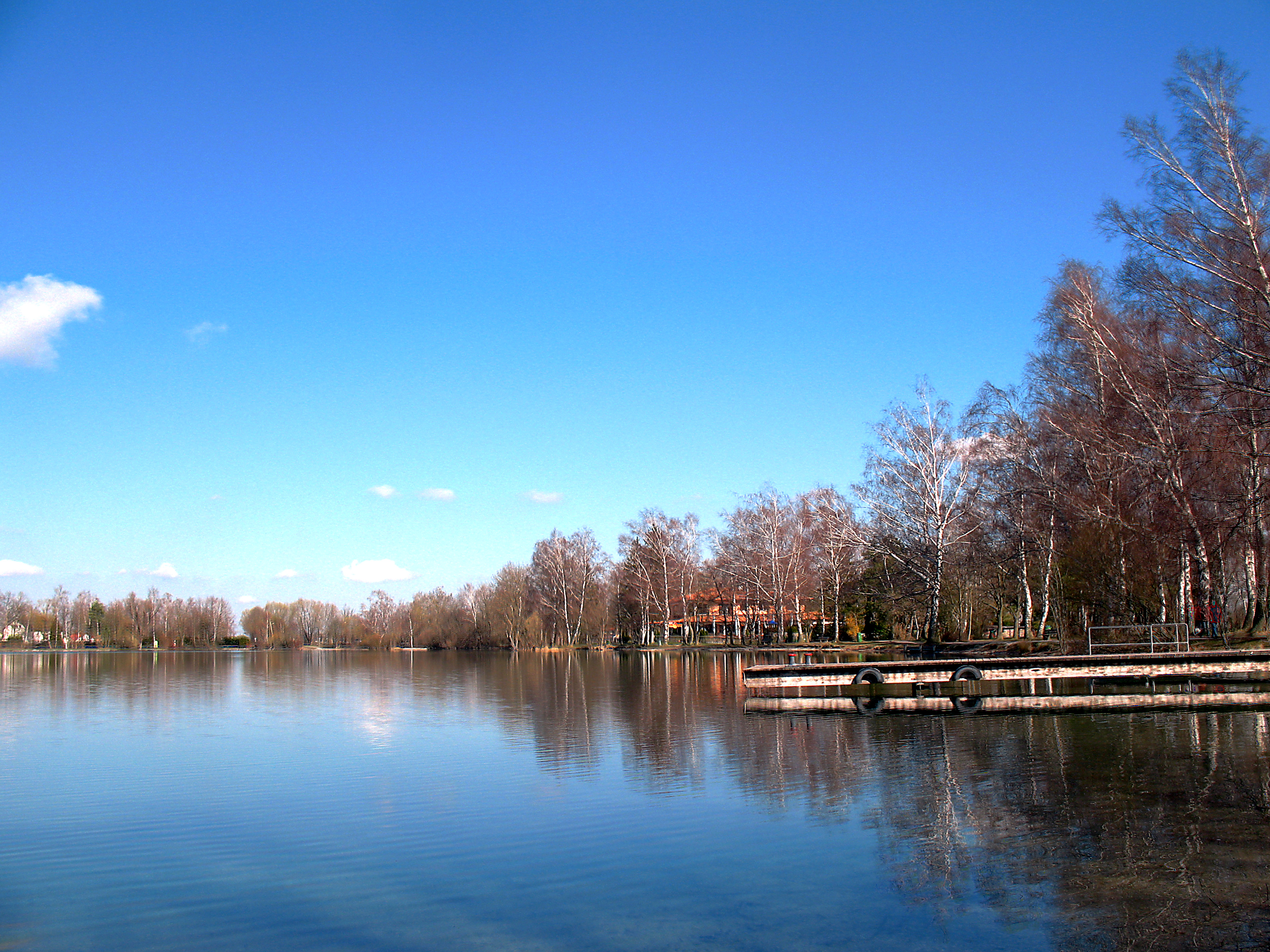 Wasserwachtsteg am Olchinger See, im Hintergrund italienisches Restaurant